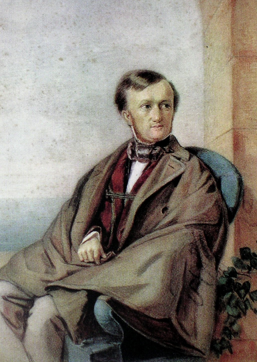 Aquarell von Clementine Stockar-Escher